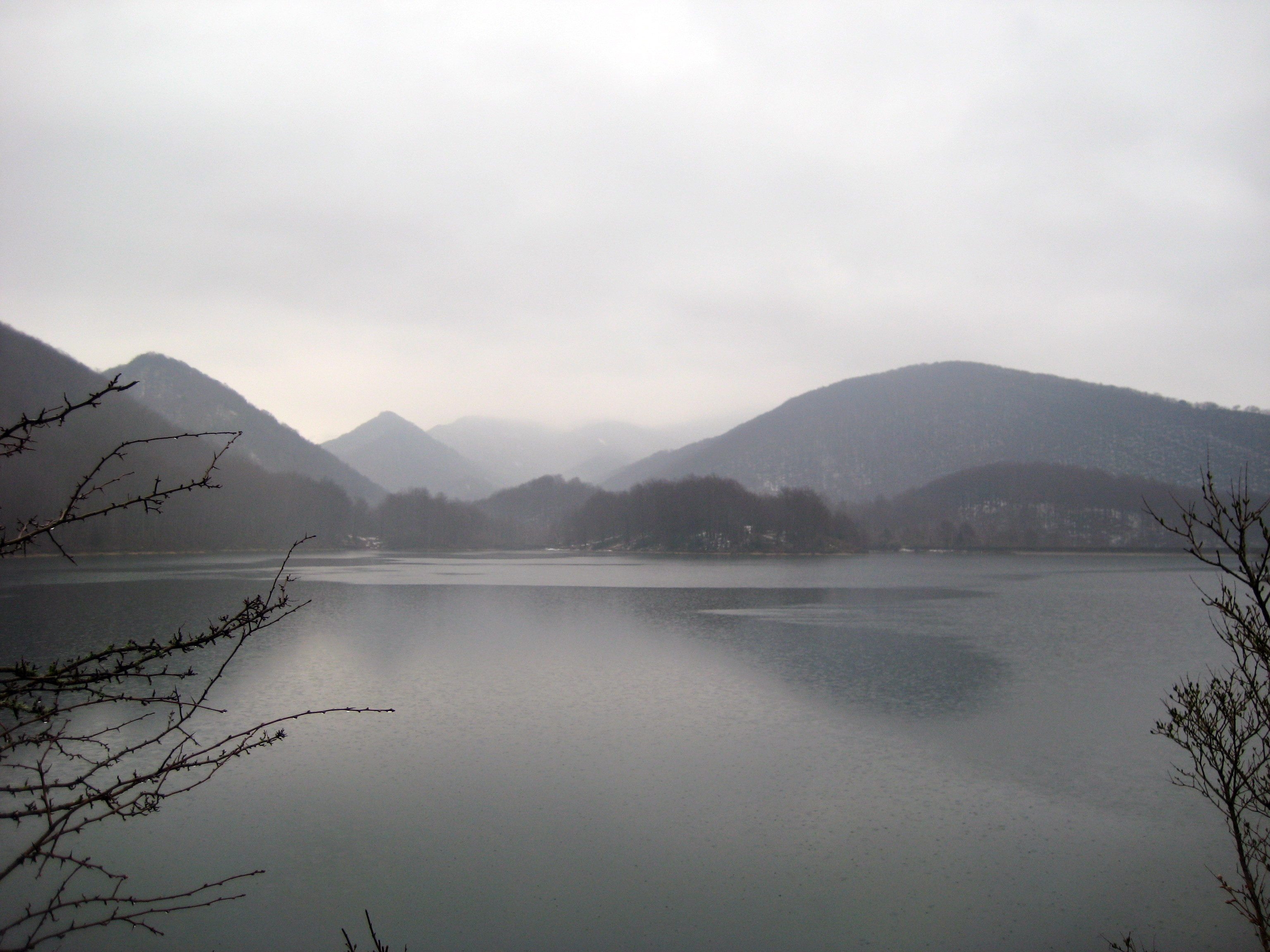 Embalse de Lareo, (Guipúzcoa, España) Lareoko urtegia.